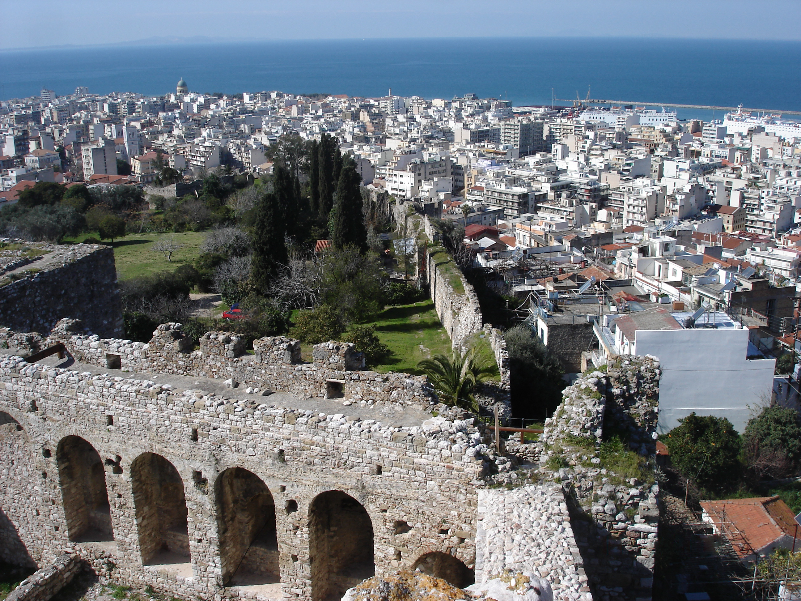 Patras Fortress Greece Το κάστρο της Πάτρας